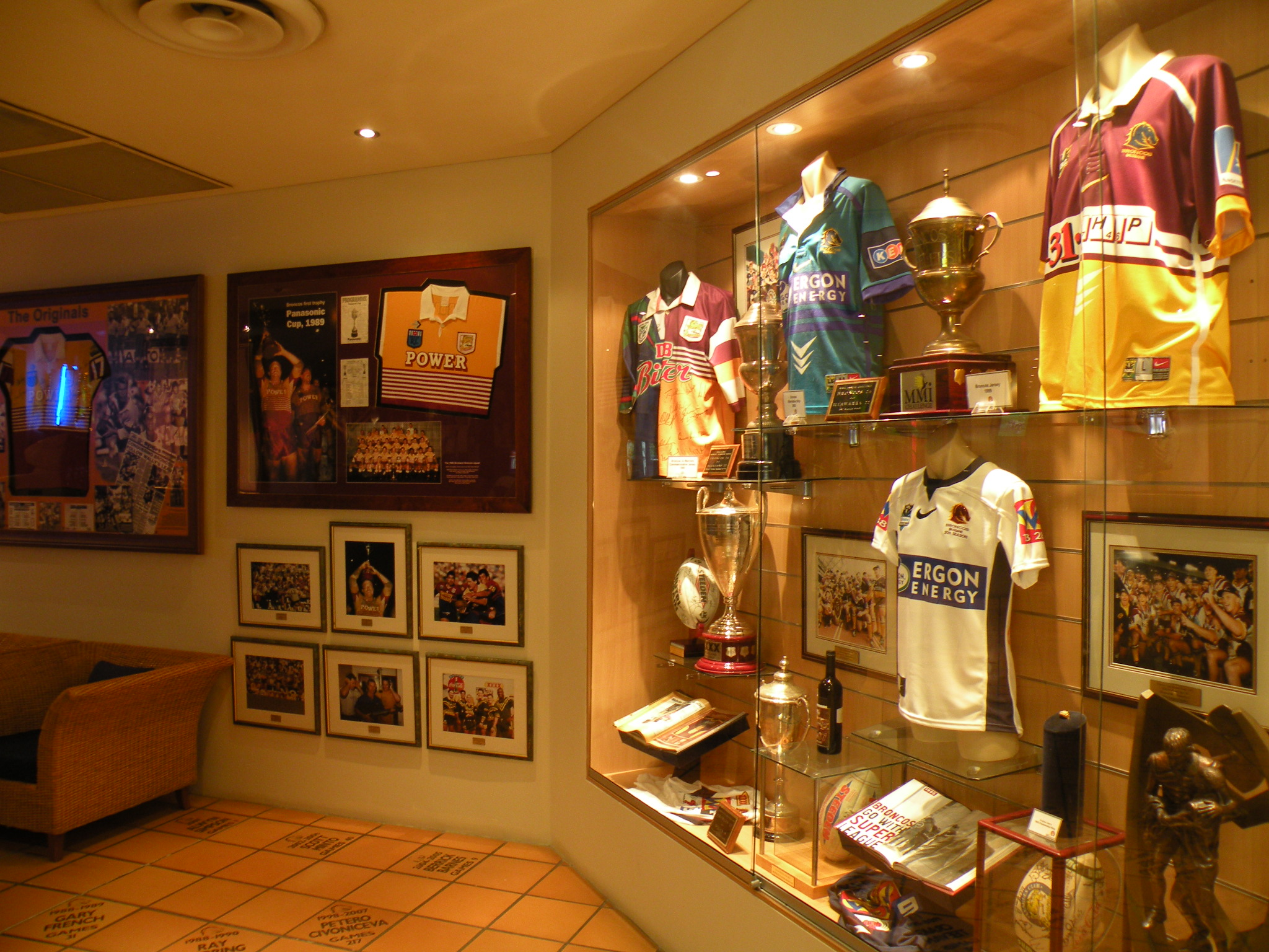 À l'intérieur de la boutique des Brisbane Broncos, trophées